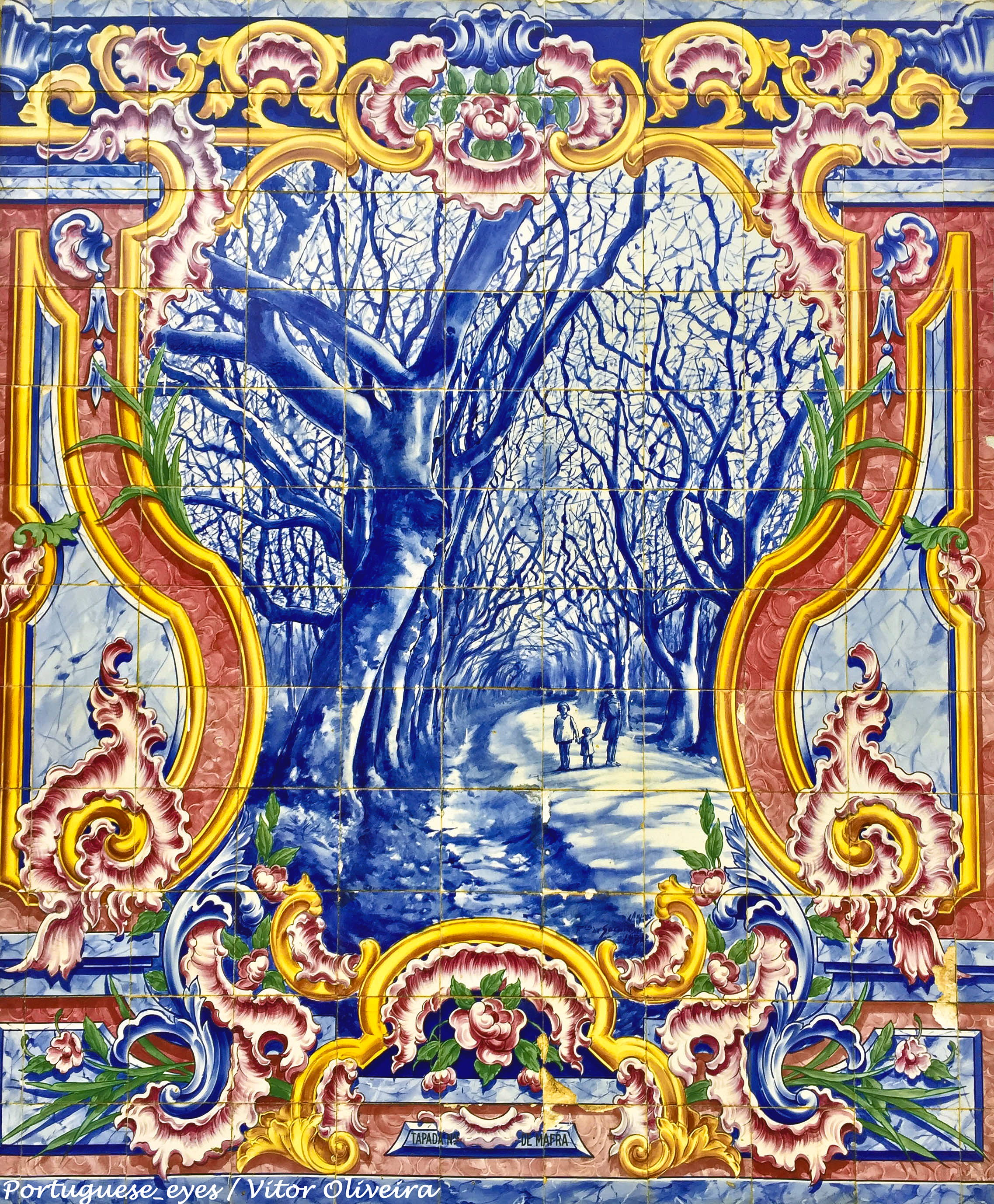 Estação Ferroviária de Mafra - Portugal 🇵🇹